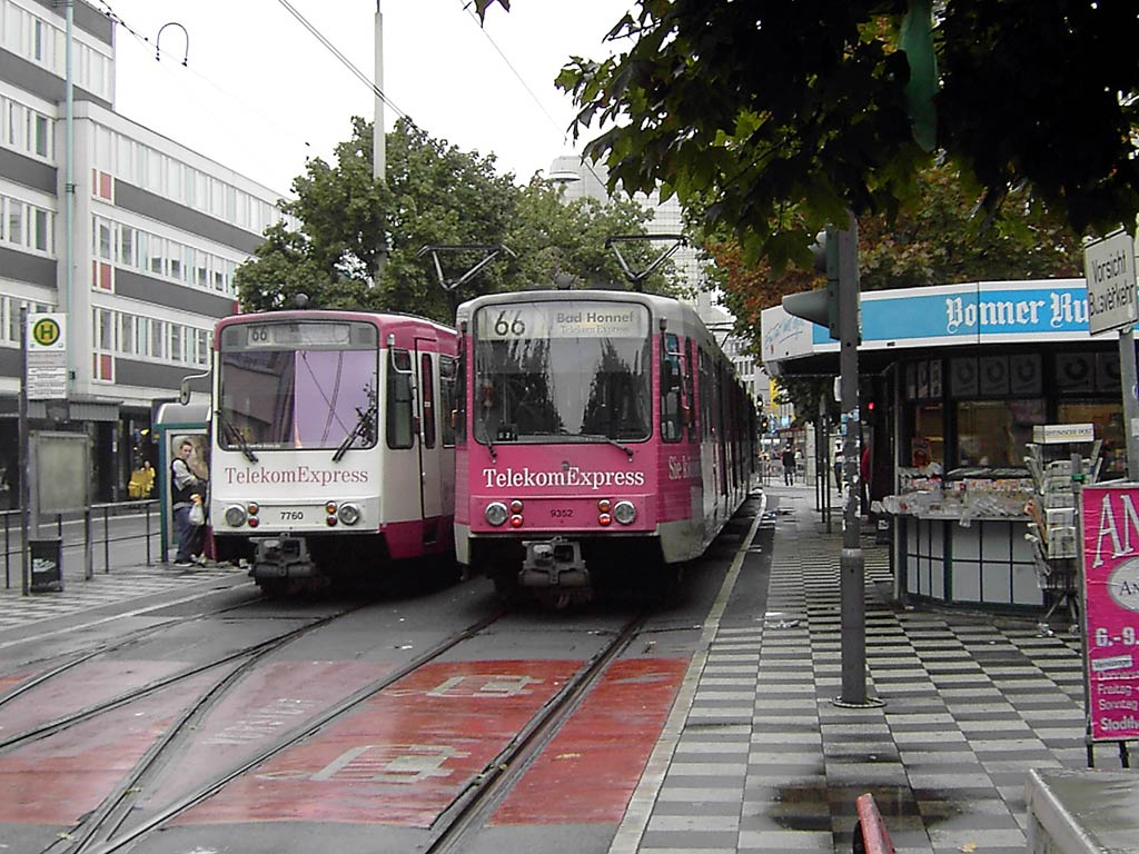 7760 und 9352 der Bonner Stadtbahn an der Haltestelle Bertha-von-Suttner-Platz/Beethovenhaus